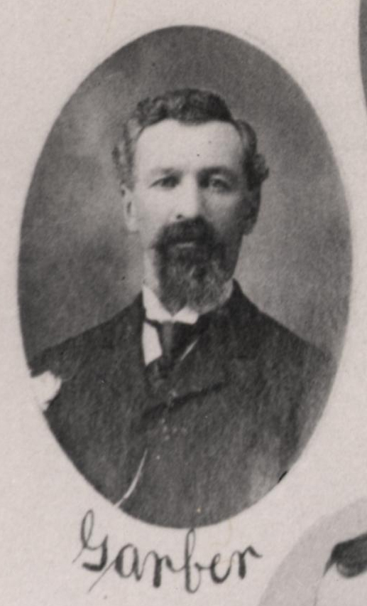 Sen Gottlieb Garber